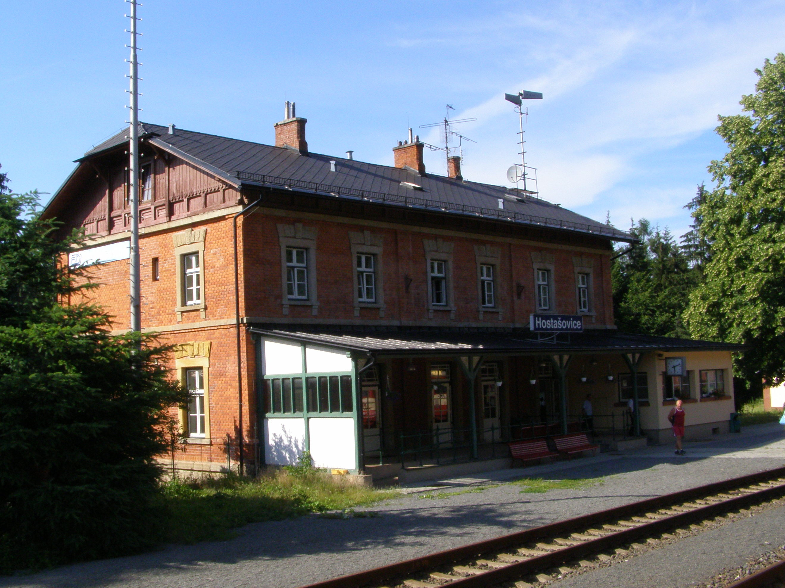 Hostašovice, železniční nádraží